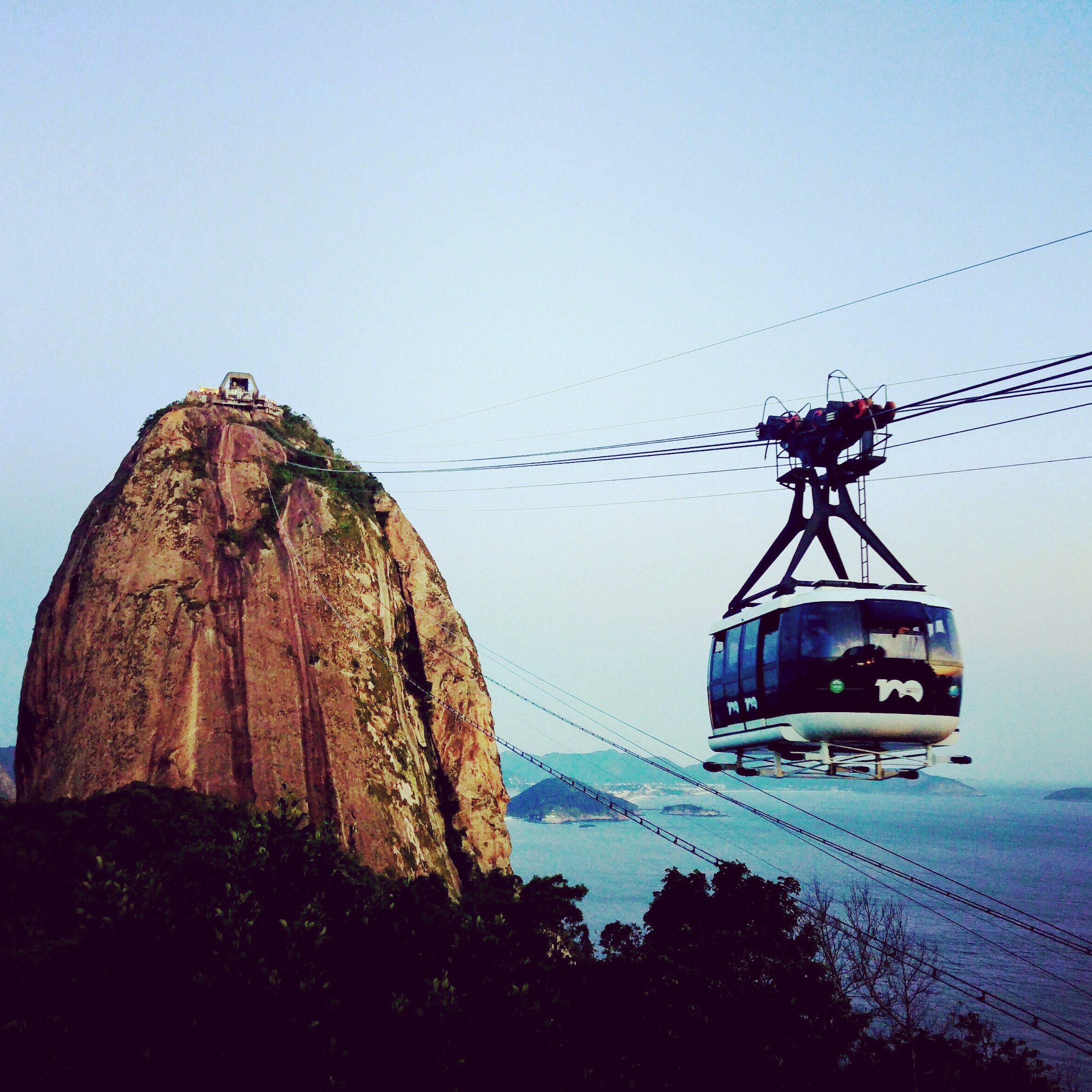 Vista del Pão de Açúcar y su teleferico